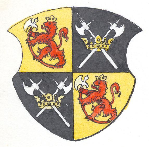 Von Uexküllide vana aadliperekonna vapp